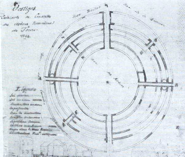 entrée de l'amphithéâtre sur un dessin de 1854